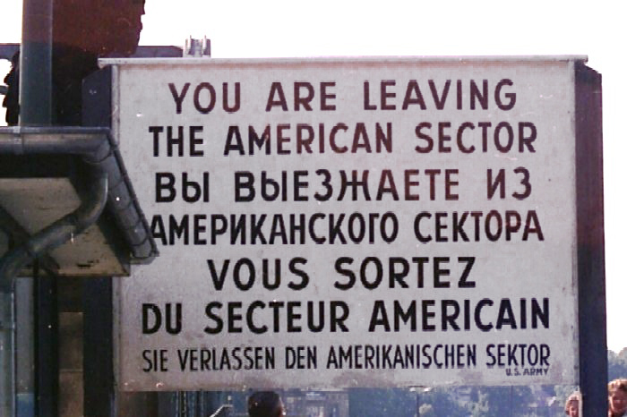 The famous "You are leaving...", photographed in Berlin Tabule na sektorové hranici v Západním Berlíně – opouštíte americký sektor photo: -jkb- 1985